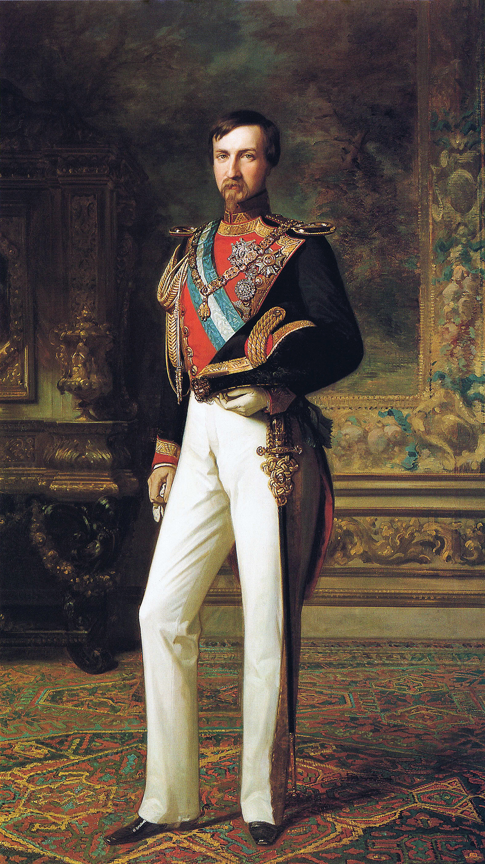 Retrato de Antonio de Orleans (1824-1890), duque de Montpensier e infante de España. Era hijo del rey Luis Felipe I de Francia y de María Amelia de Borbón-Dos Sicilias, y contrajo matrimonio con la infanta Luisa Fernanda de Borbón, hija del rey Fernando VII de España y hermana de la reina Isabel II, que concedió al duque de Montpensier el título de infante de España.